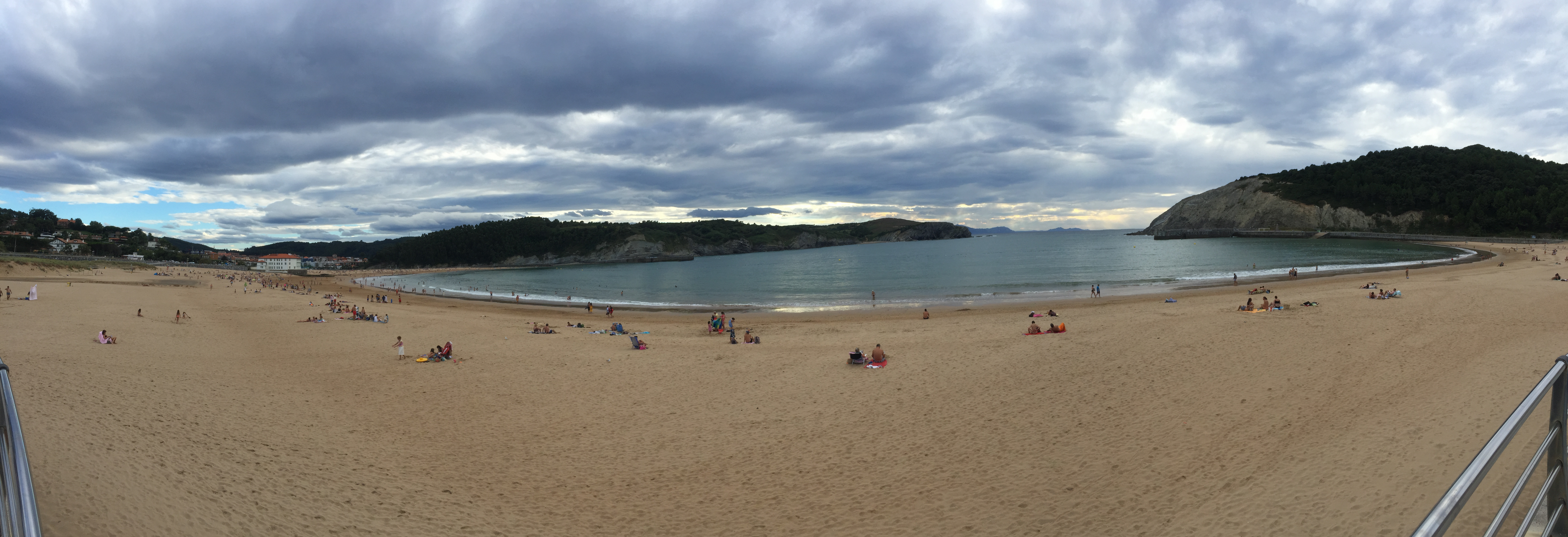 Plentzia, Gorliz eta Astondo